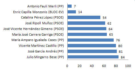 Número de votos por candidato en las elecciones locales de 2003